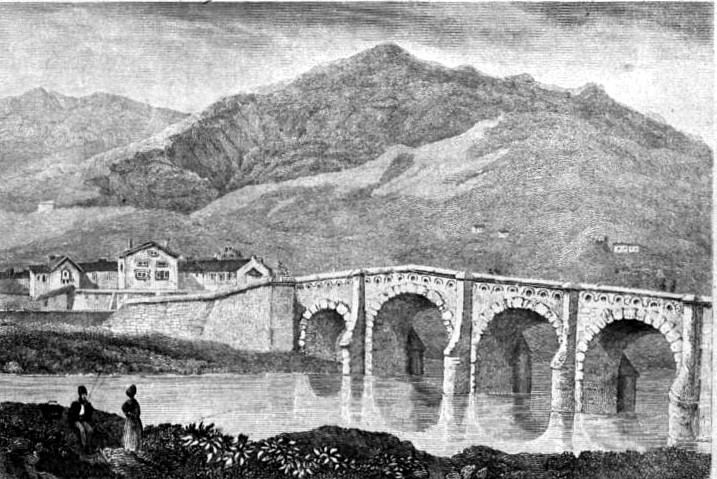 Image en provenance du livre : Eusèbe Girault de Saint-Fargeau, Guide pittoresque du voyageur en France, contenant la statistique et la description complète des quatre-vingt-six départements, orné de 740 vignettes et portraits gravés sur acier, de quatre-vingt-six cartes de départements et d'une grande carte routière de la France, par une Société de gens de lettres, de géographes et d'artistes, Paris, F. Didot frères, 1838, 6 volumes in-8° (BNF : 8-L25- 46). Volume III Didot frères, 1838. Route de Paris à Nice traversant les départements de l'Isère, des Hautes-Alpes, des Basses-Alpes et du Var. auteurs dessins : Rauch (ou autre) auteurs gravures : Skelton fils, Schroeder, Bishop (ou autre)